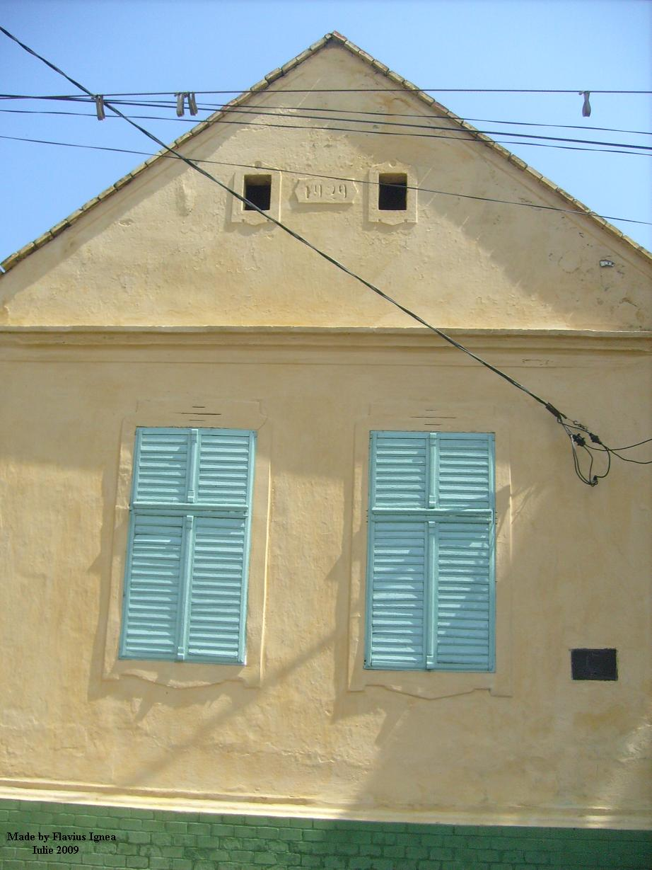 Casa din comuna Freidorf